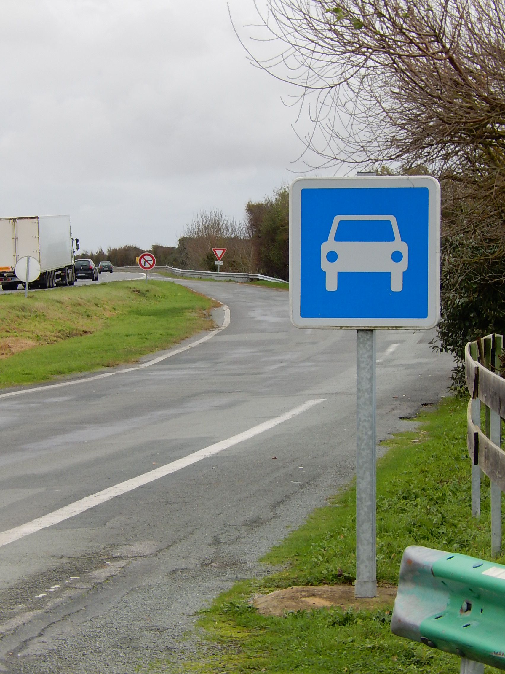 Panneau de signalisation français de type C107, implanté à la sortie de l'aire de repos de la Baie d'Yves, sur la route départementale 137, à Yves (Charente-Maritime).